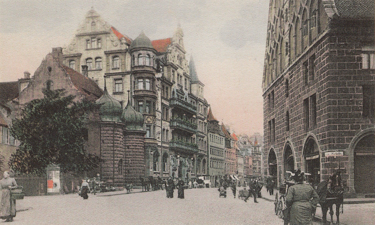 Ansichtskarte v. Apollo-Theater Nürnberg